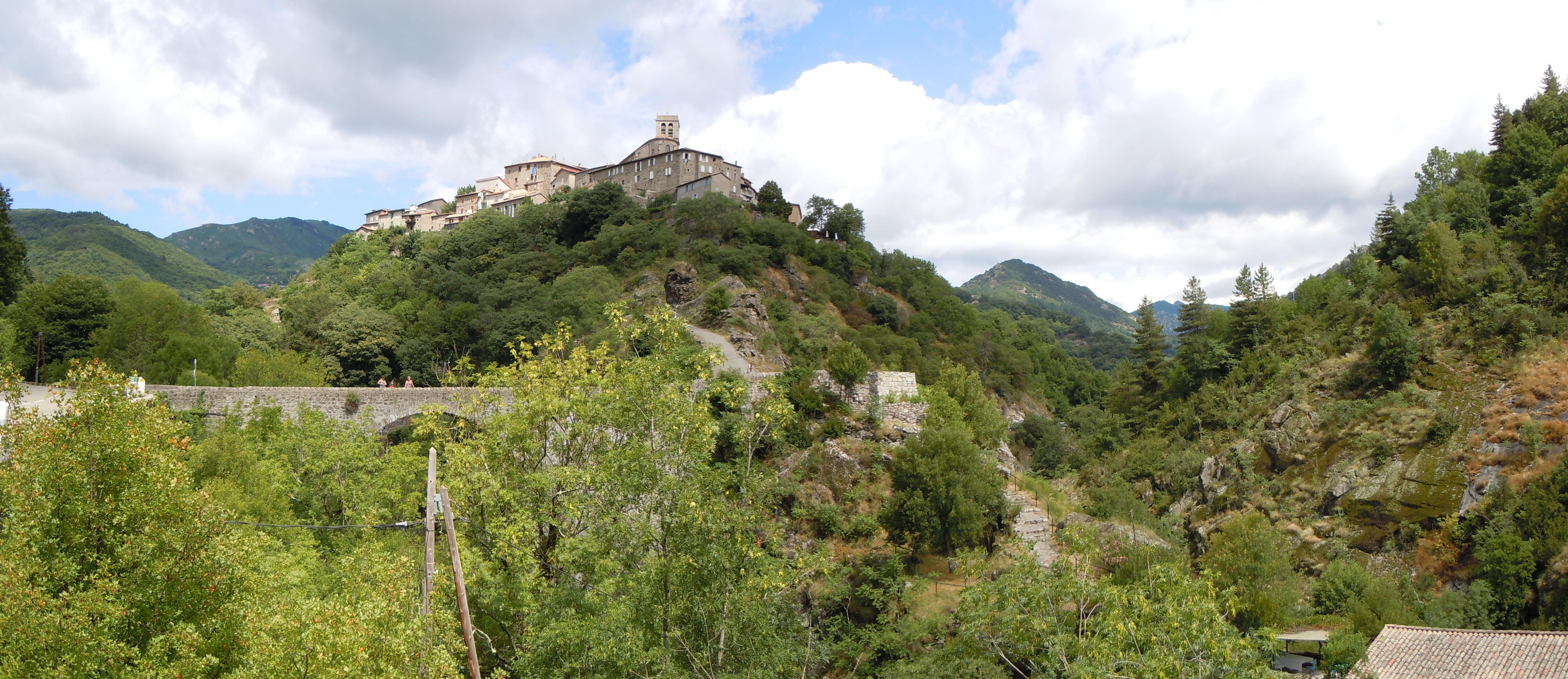 Antraigues-sur-Volane - Ardèche - France : Vue Panoramique